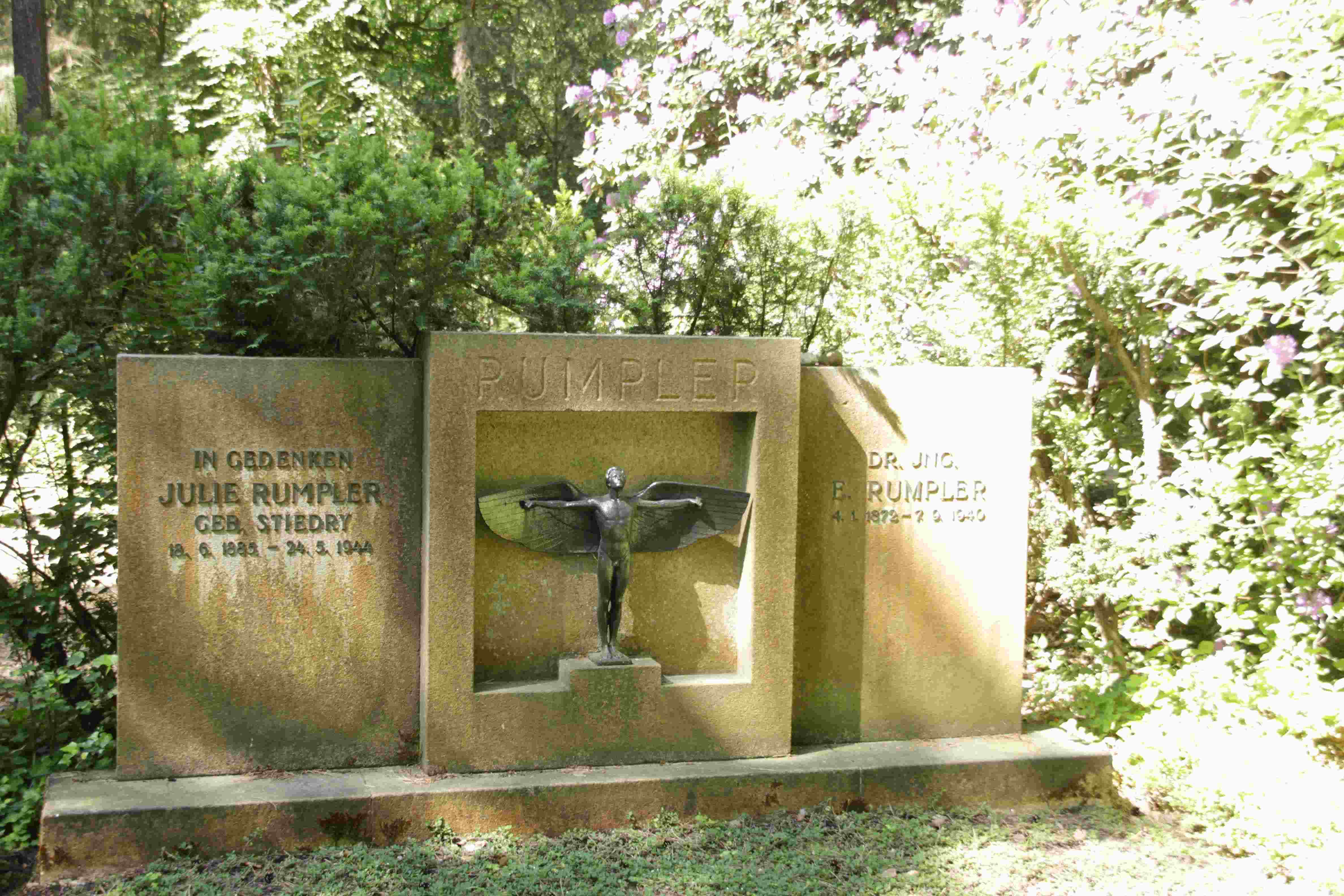 Grabstein Edmund Rumpler (*4. Januar 1872 in Wien, gest. 7. September 1940 in Neu Tollow) auf dem Südwest-Kirchhof, Stahnsdorf